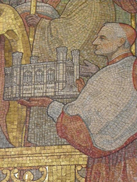 Pierre-Hector Cardinal Coullié (archevêque de Lyon). Fragment d'une mosaïque de Charles Lameire (1832-1910) en la basilique Notre-Dame de Fourvière à Lyon (Arrivée de saint-Pothin).